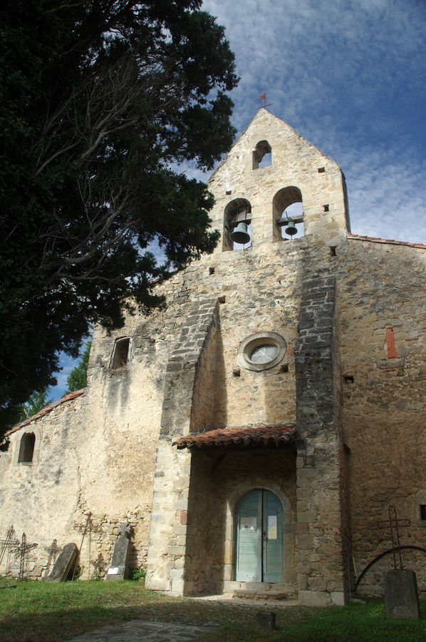 Ayant adhéré à la Réforme, vers le milieu du 16e siècle, l'église devient un lieu de culte réformé. Elle est rendue aux Chevaliers de Malte dès l'application de l'Edit de Nantes (1598). Le temple protestant édifié entre temps, fut démoli en 1668 sur ordre de Louis XIV. Eglise restaurée en 1725 (redéfinition des proportions). Sous les deux contreforts du clocher, l'accès se fait en franchissant un large porche étayé par un pilier central. Le portail, en plein cintre, est surmonté de l'écusson royal et daté de 1725. .